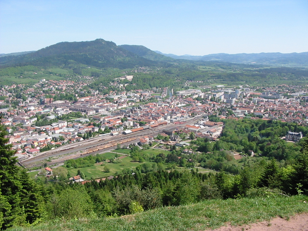 Saint-Dié-des-Vosges Vue d'ensemble depuis la Roche Saint-Martin. Photographie personnelle, prise le 4 mai 2003. Copyright © Christian Amet